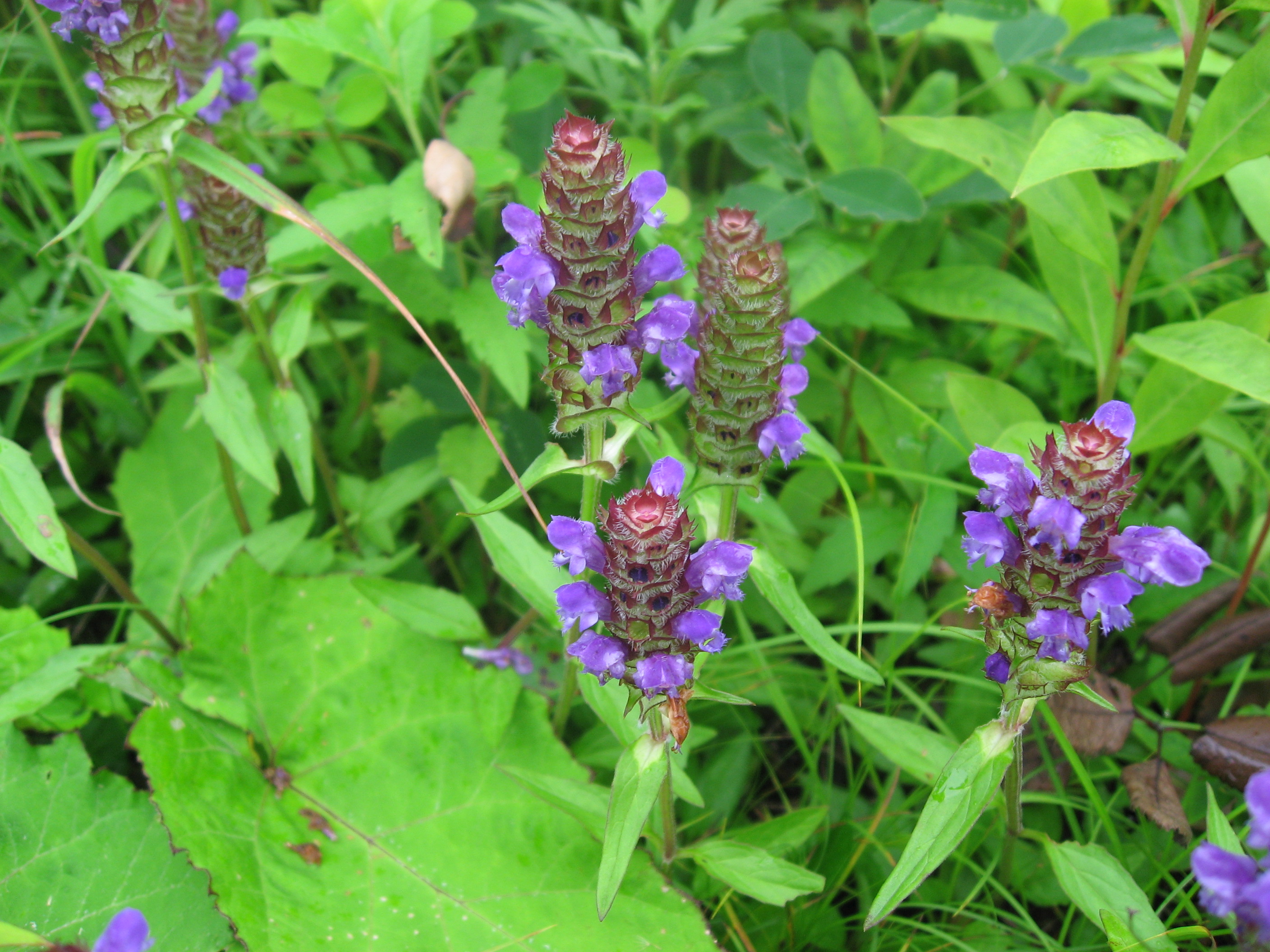 ウツボグサ Prunella vulgaris subsp. asiatica